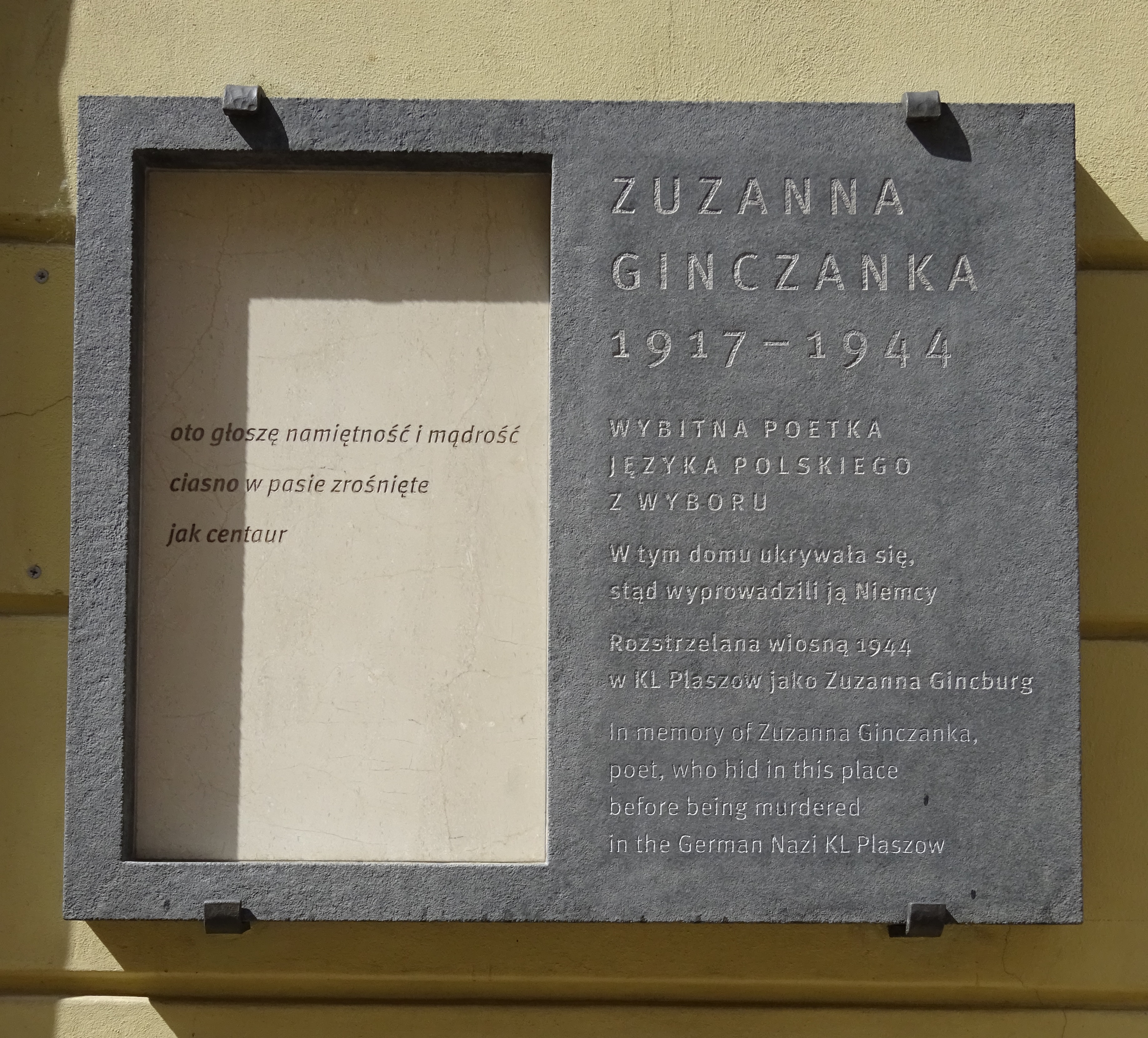 Ulica Mikołajska 26 - tablica upamiętniająca Zuzannę Ginczankę - polską poetkę pochodzenia żydowskiego, rozstrzelaną w 1944 roku w KL Plaszow. Tablica wmurowana w miejscu, gdzie się ukrywała w latach 1943-1944, w 100-lecie jej urodzin w marcu 2017. Kraków, 2017.